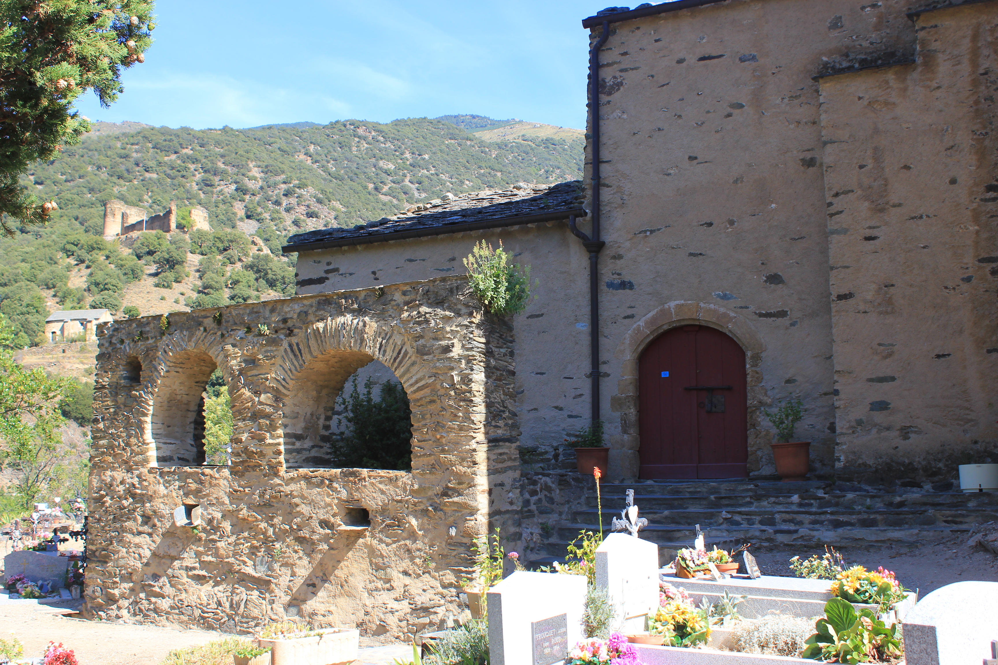 Evol-France Pyrénées orientales Un des plus beaux villages de France Le conjurador de l'église Saint André